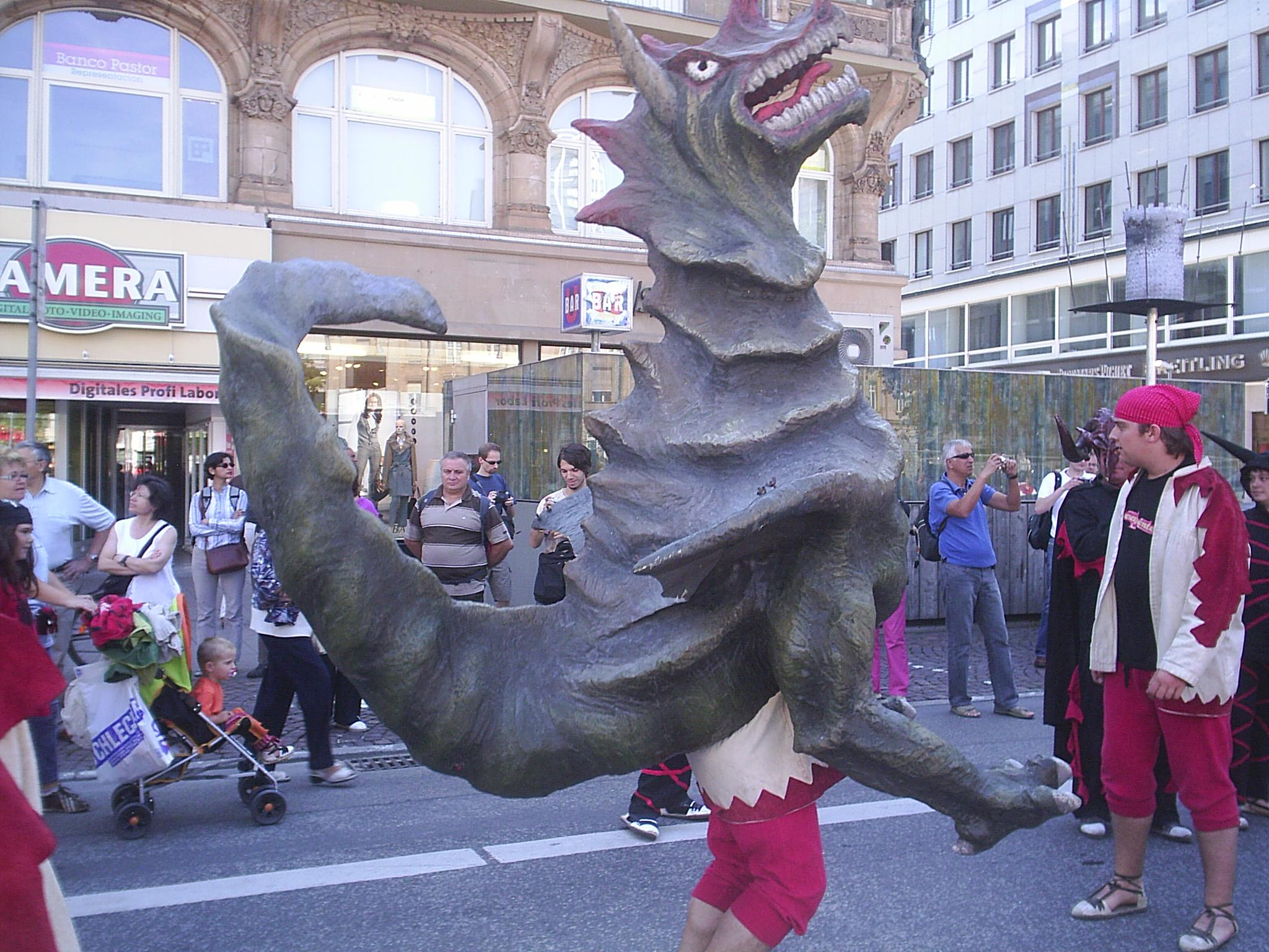 Ceballot, el drac de Montornès a Frankfurt 2007.